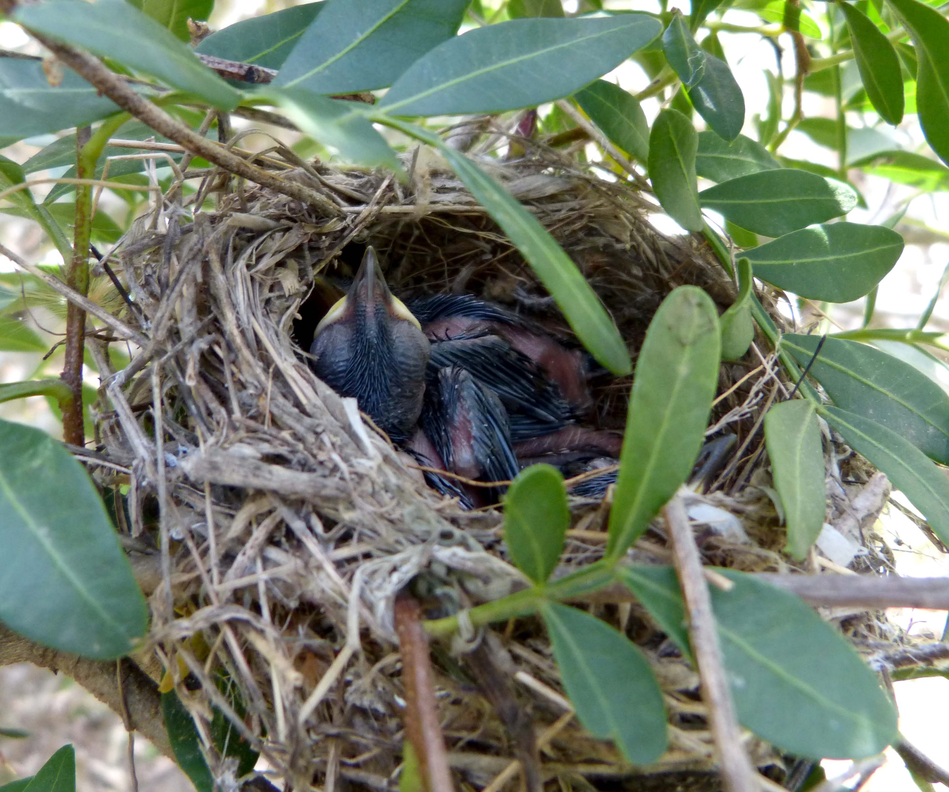 Jimena. Andalucia, Spain